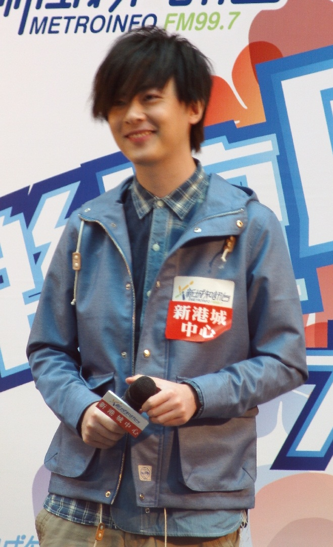 中文（香港）: 洪卓立的樣子